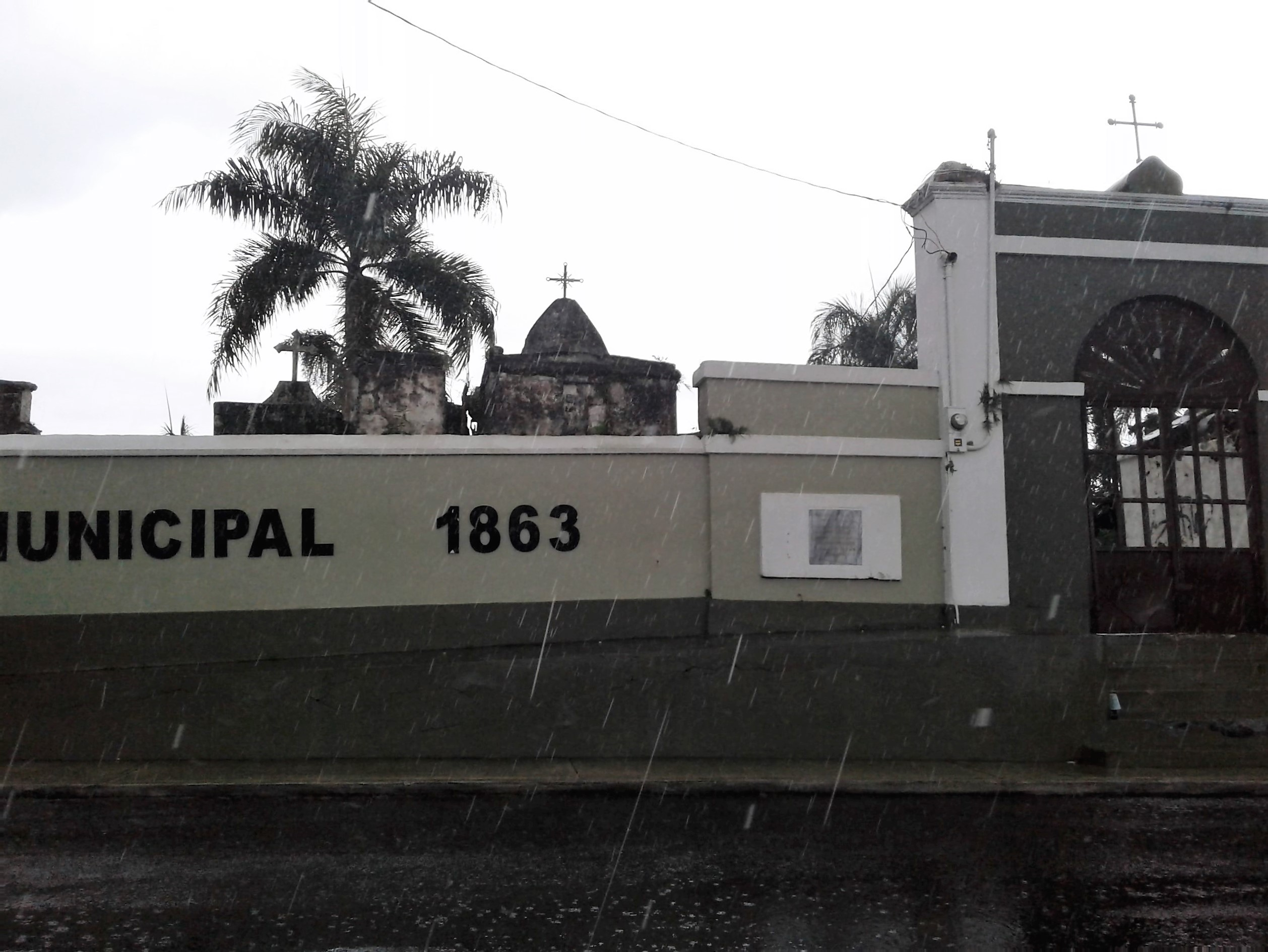 Antiguo Cementerio Municipal de San Sebastián, 22 Ave Ruiz Belvis, San Sebastián, 00685, Puerto Rico